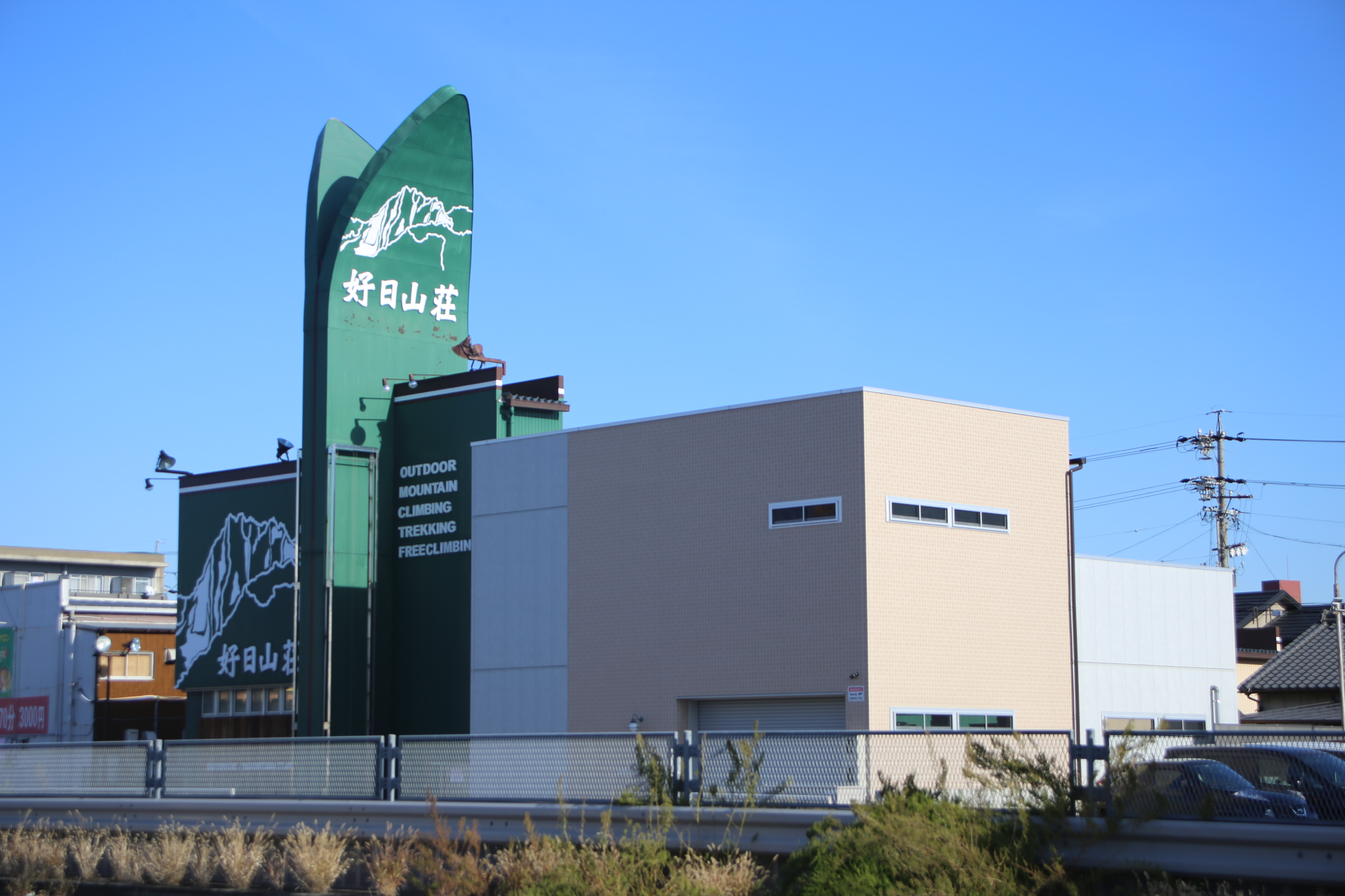 愛知県春日井市の好日山荘春日井店